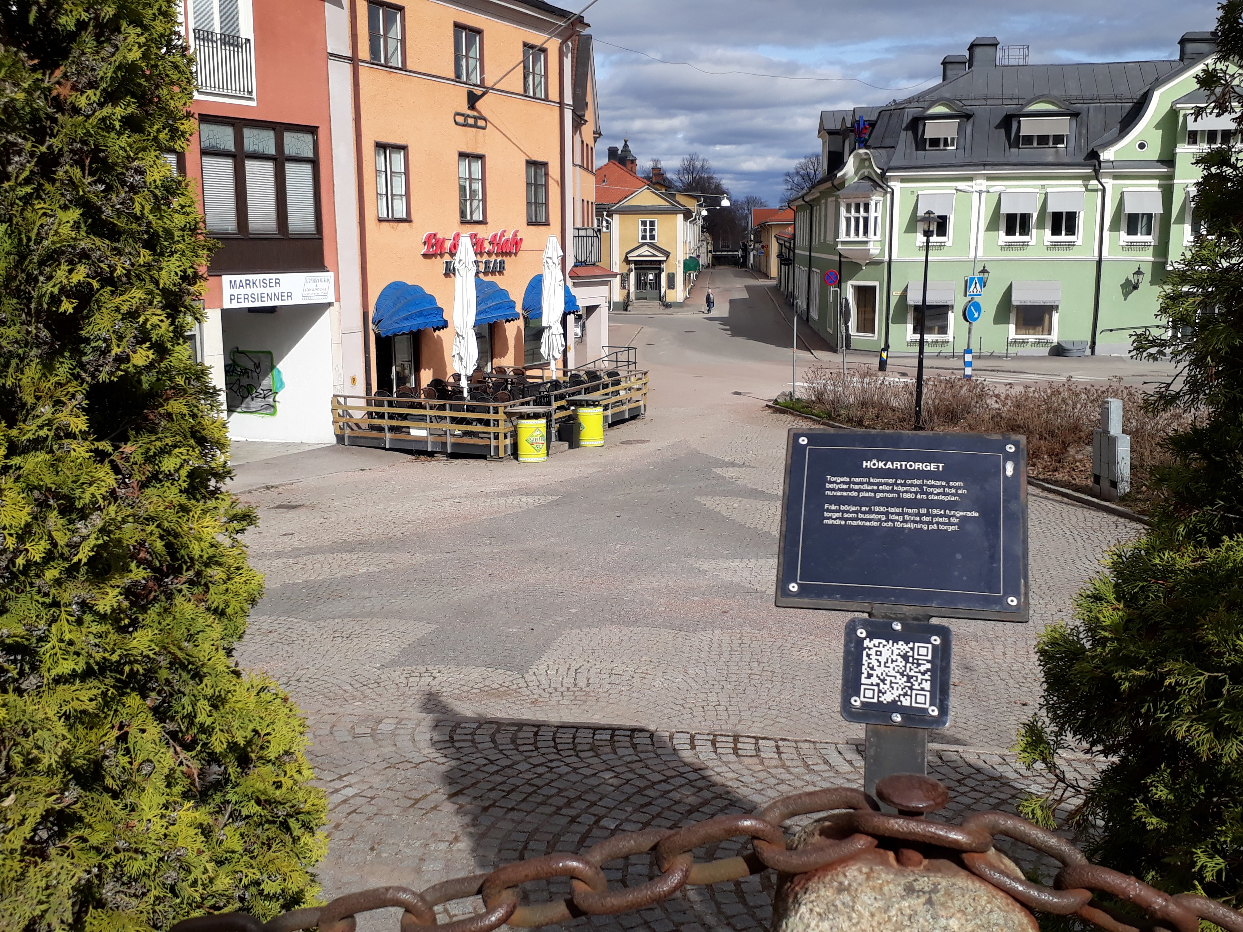 Hökartorget, Hedemora, Dalarnas län, Sverige.